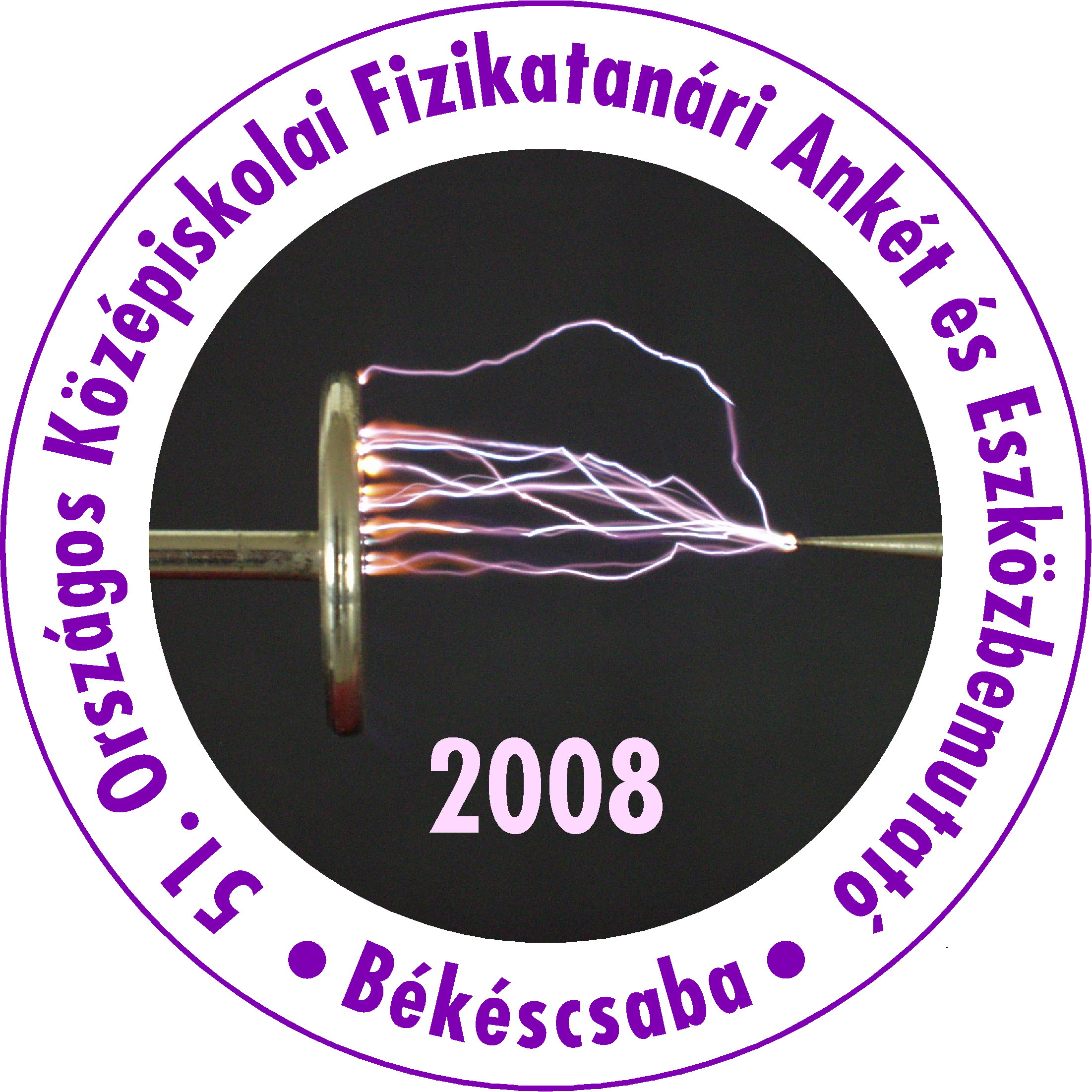 Az 51.Országos Középiskolai Fizikatanári Ankét és Eszközbemutató emblémája (Békéscsaba, 2008. március 26–30.)